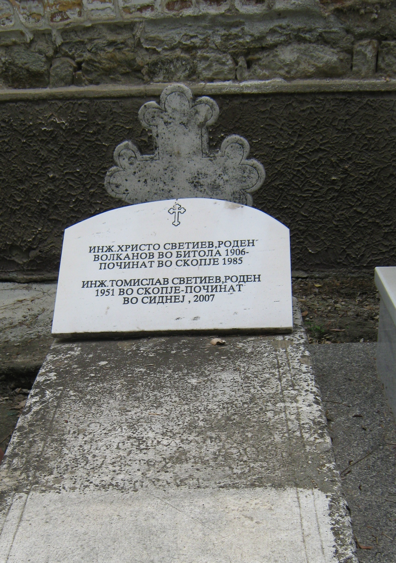 Гробот на Христо Светиев во Битолските Светонеделски Гробишта